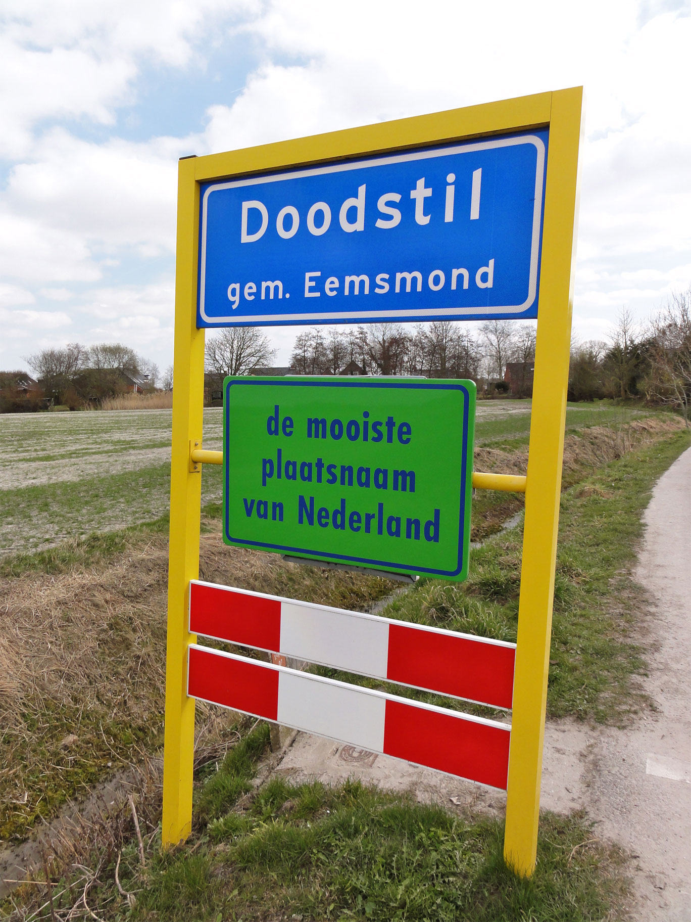 Doodstil